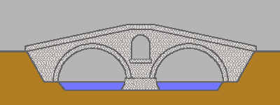 Natursteinbrücke mit Zwei Boegen und Entlastungsbogen.png